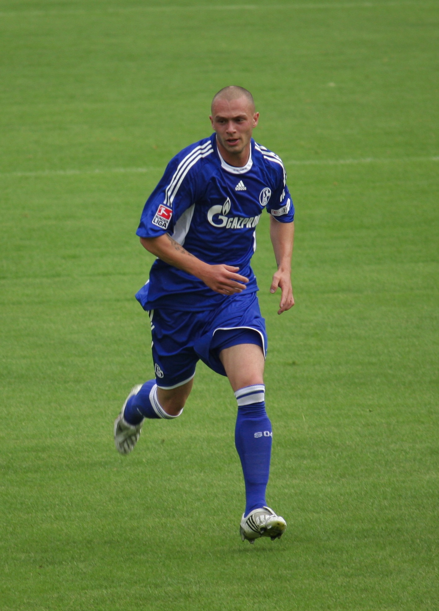 Christian Pander während eines Freundschaftsspiels gegen die SG Wattenscheid 09 am 09.07.2008 im Wattenscheider Lohrheidestadion